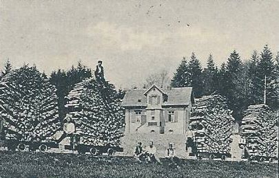 Waldeisenbahn Welschbruch